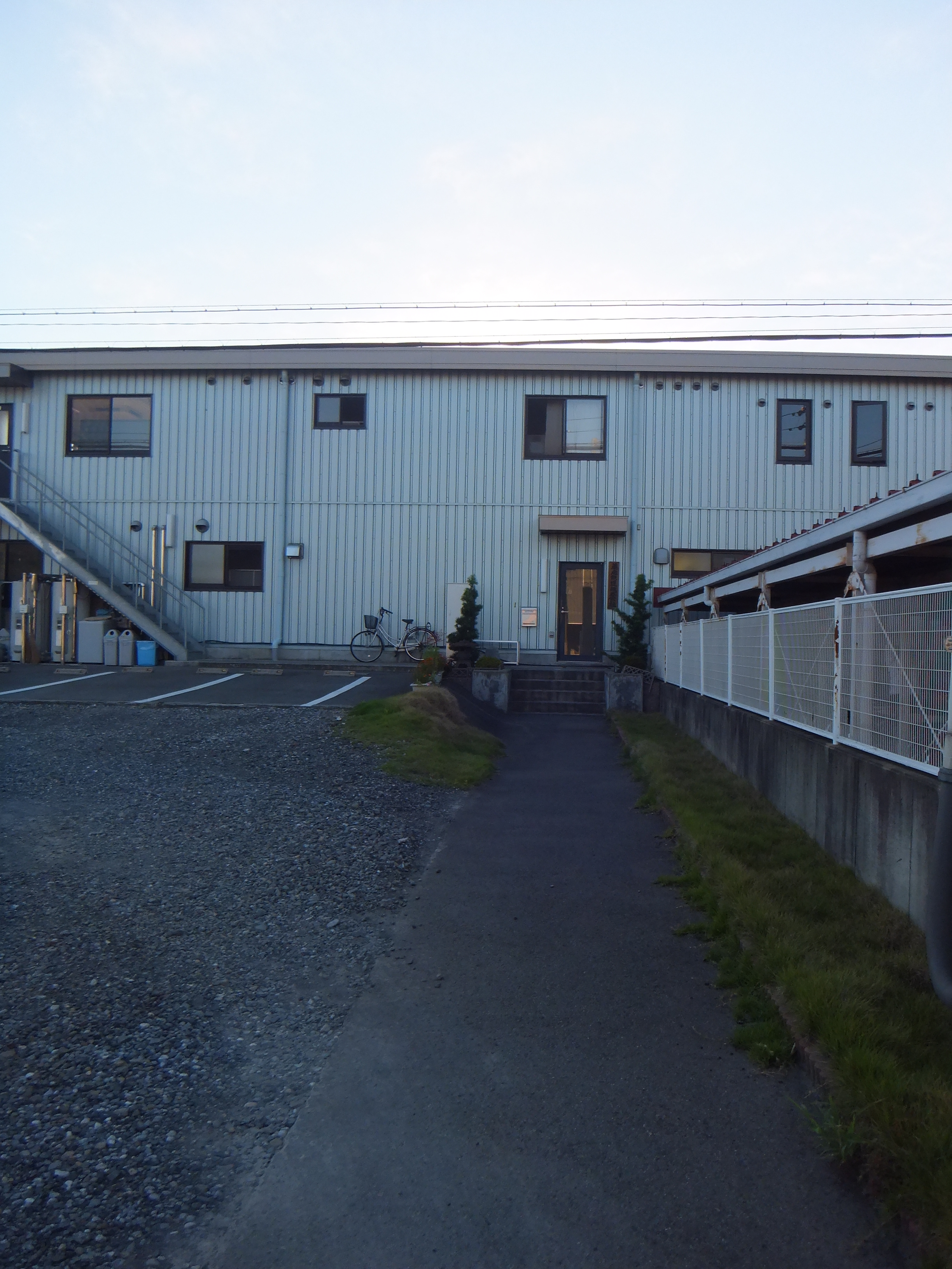 養老鉄道本社社屋